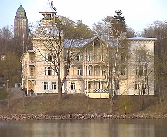 Villa Kivi in Helsinki, Finland